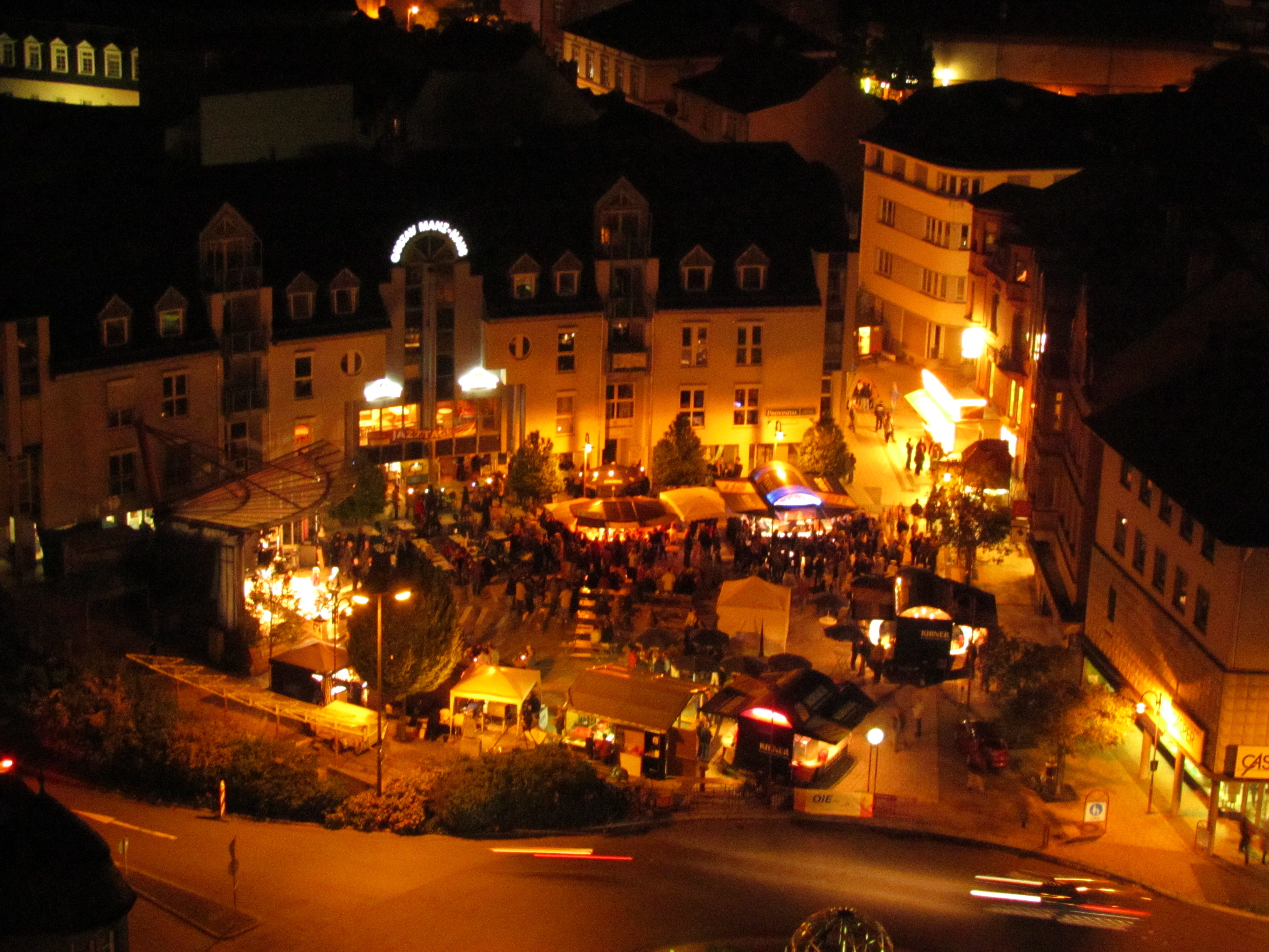 Bildinhalt: Der Schleiferplatz in Idar bei Nacht, während eines Konzertes der Jazztage. Aufnahmeort: Idar-Oberstein, Deutschland